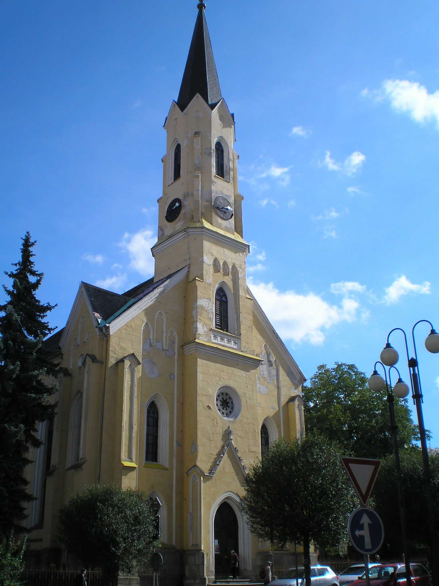 Kostel evangelický, Chrám pokoje (Cheb), 26. dubna, Obrněné brigády, Cheb